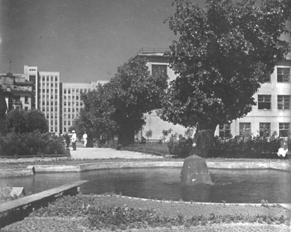 БДУ. Сквер і фантан. Універсітэцкі гарадок, 1930-я